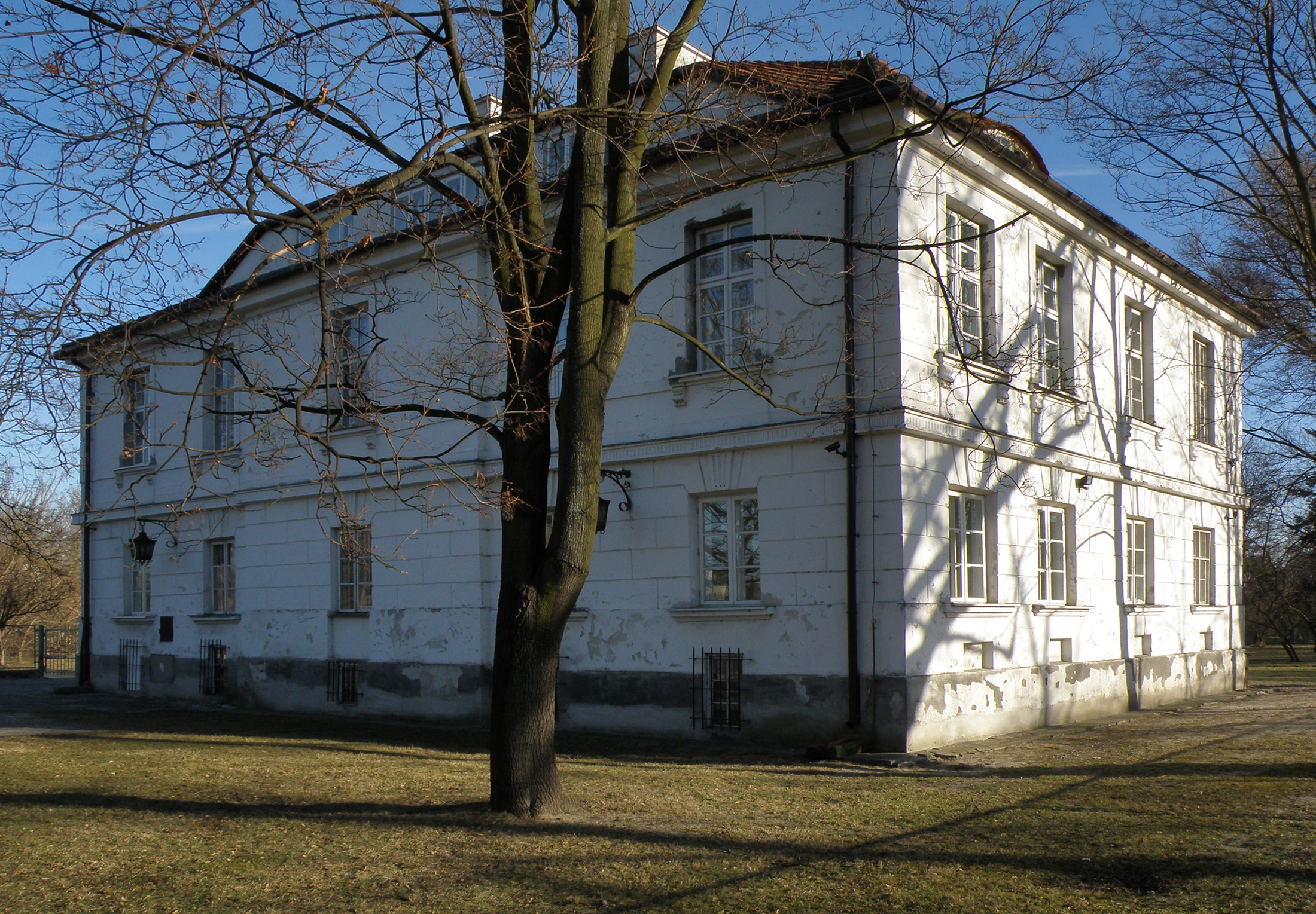 Dwór księcia Michała Poniatowskiego (Dworek Grochowski), Warszawa, Praga Południe